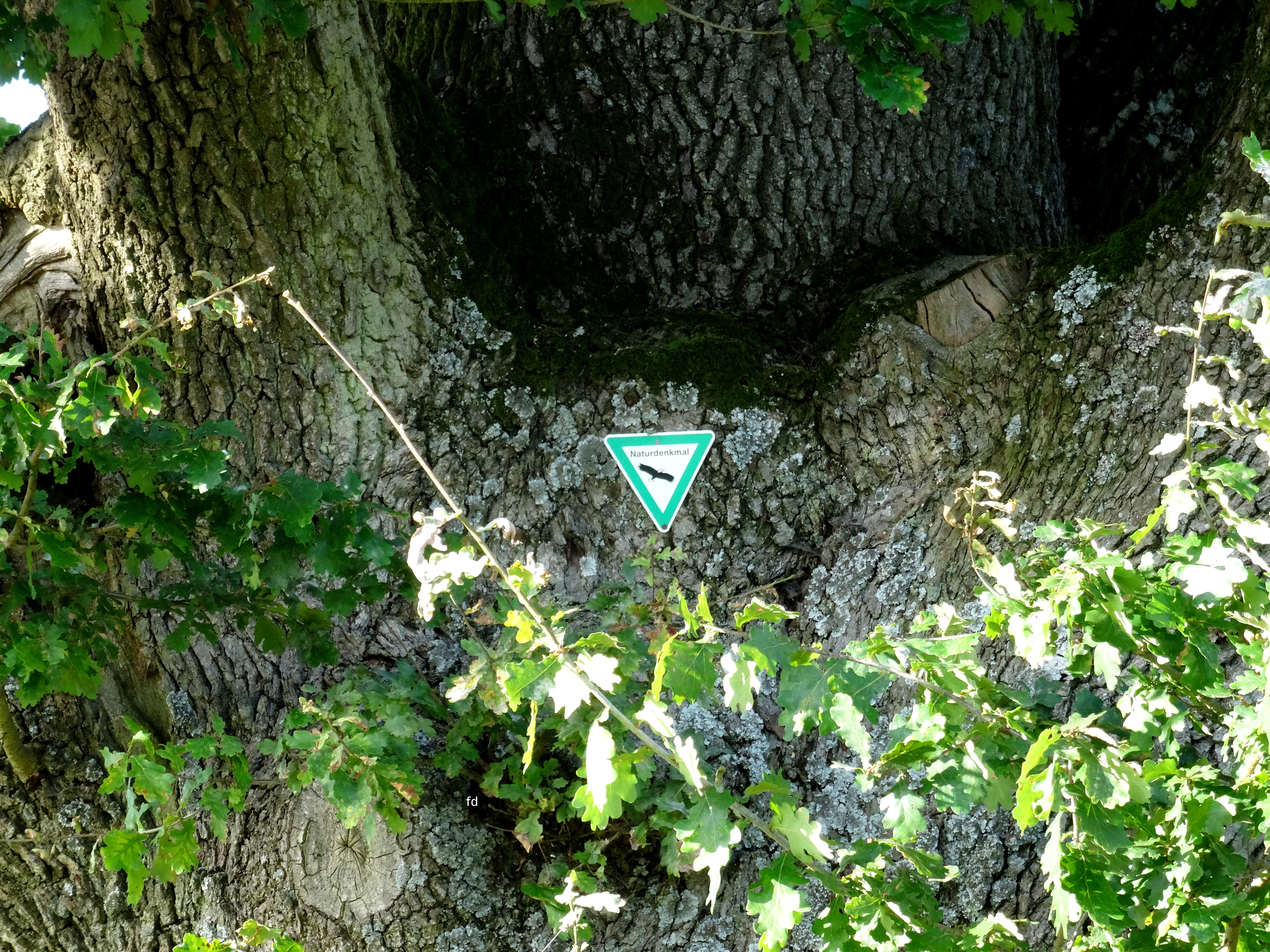 Schild am Naturdenkmal 2.2.31 „Eiche“ in Meschede Schederberge